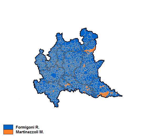 Candidati vincitori nei singoli comuni nelle Elezioni regionali in Lombardia del 2000.